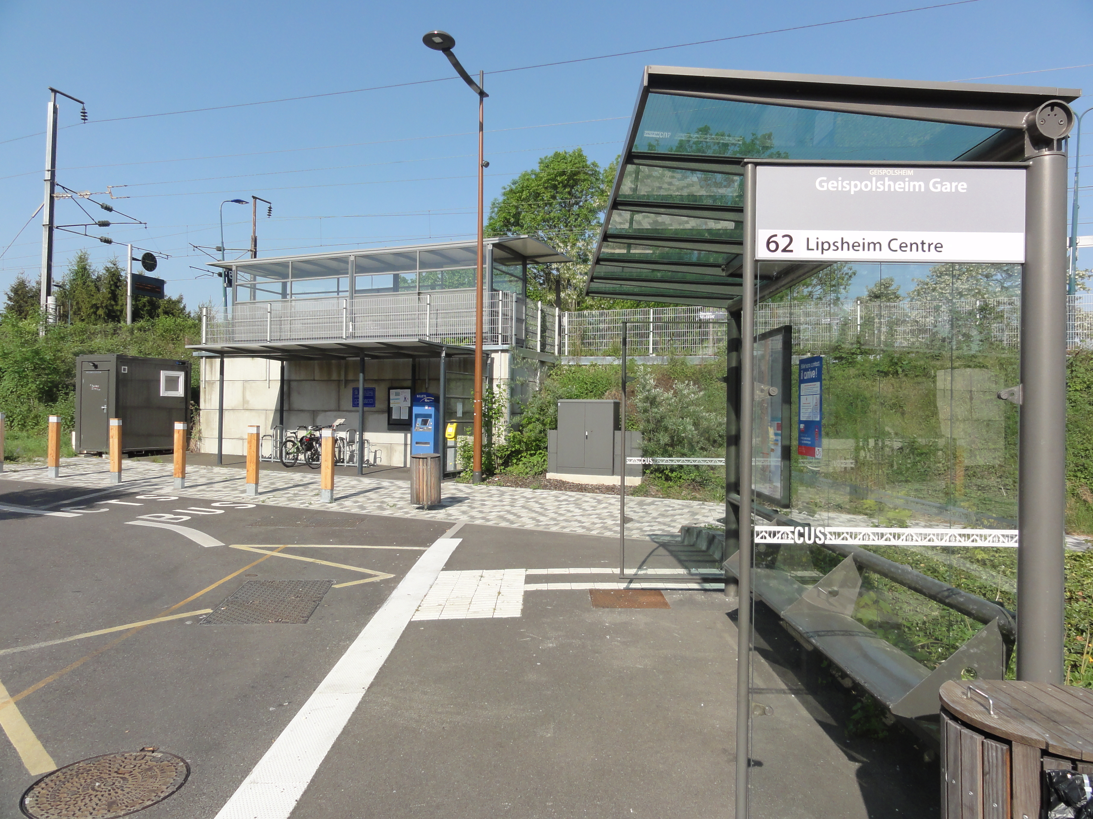 Geispolsheim-gare (Geispolsheim, Bas-Rhin) la gare